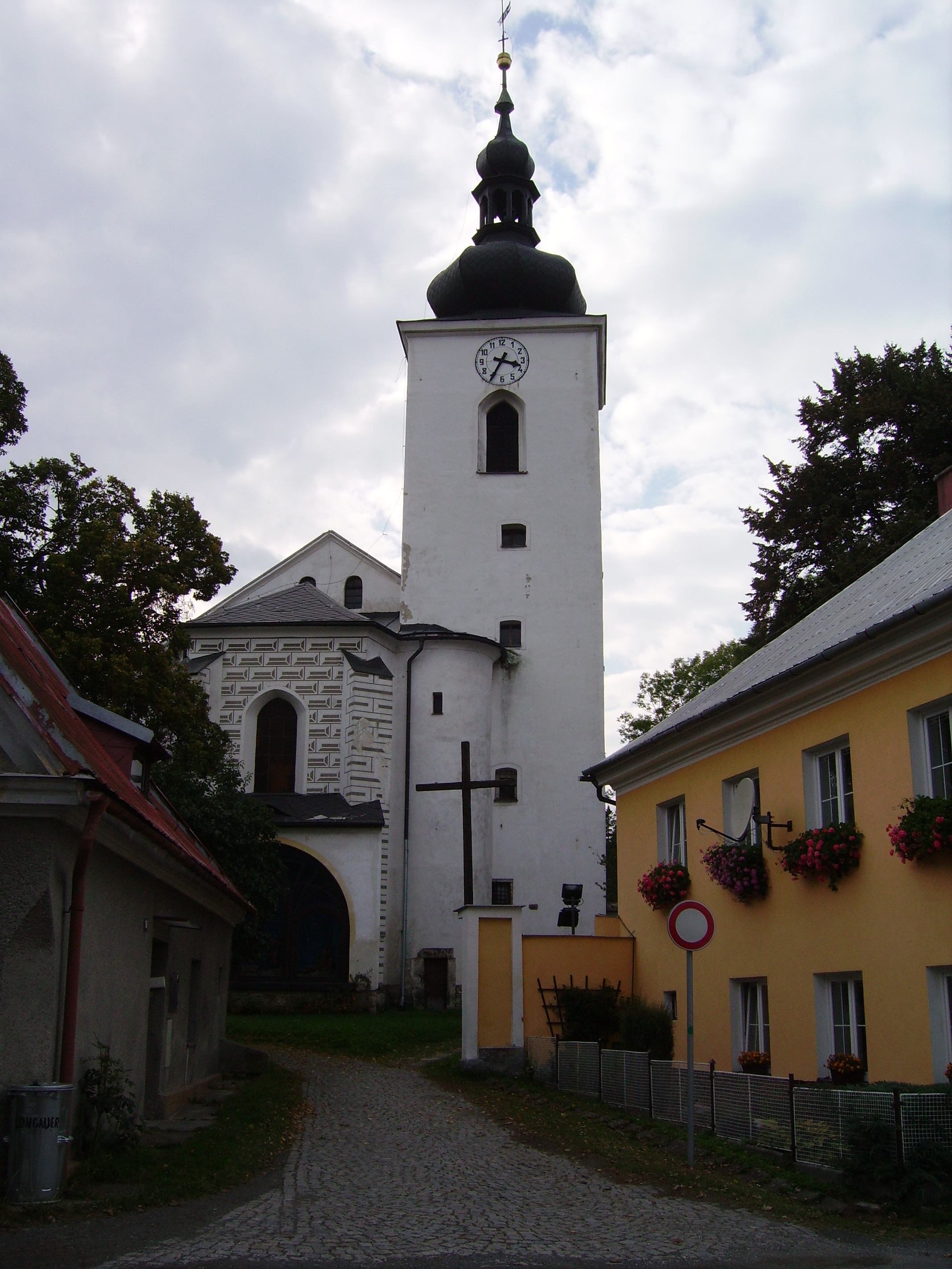 Moravský Beroun: Kostel Nanebevzetí Panny Marie